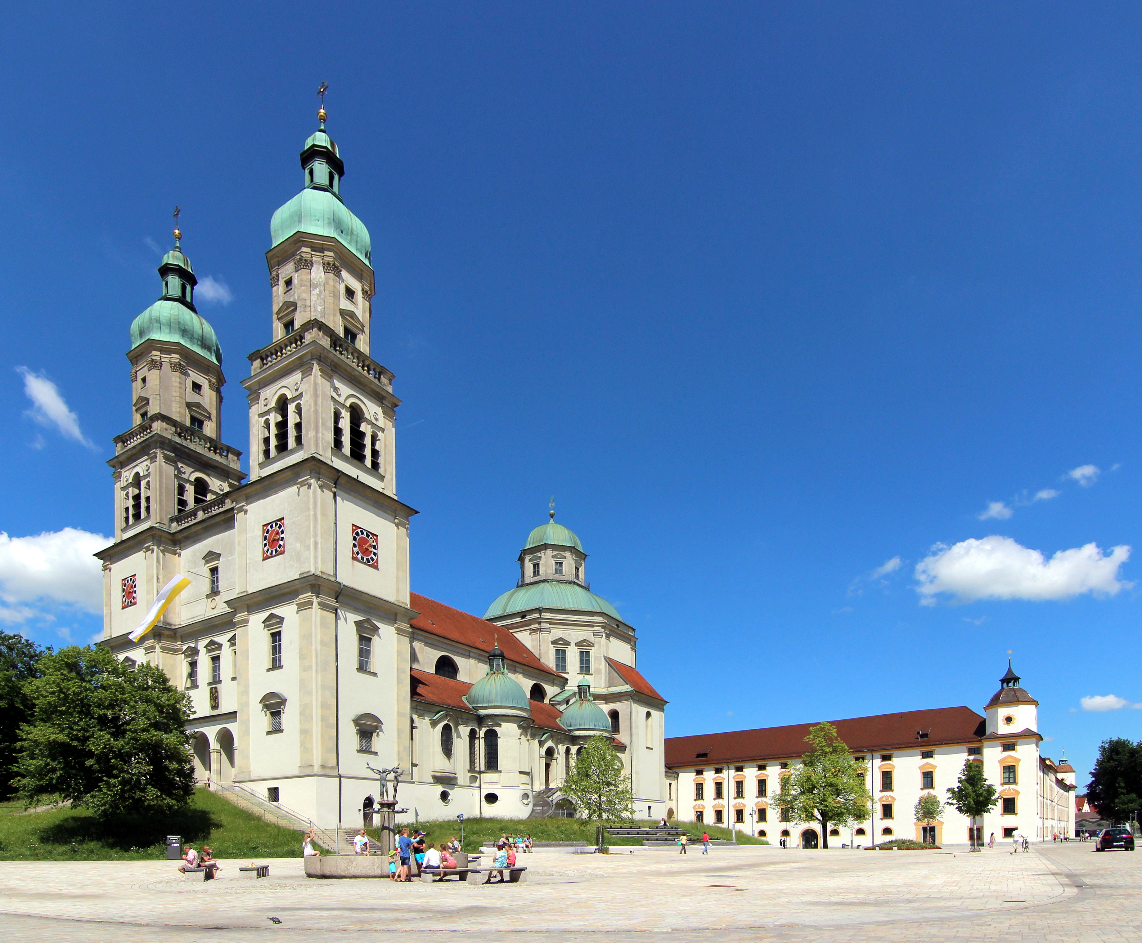 Hildegardplatz in Kempten: Basilika St. Lorenz und Fürstäbtliche Residenz